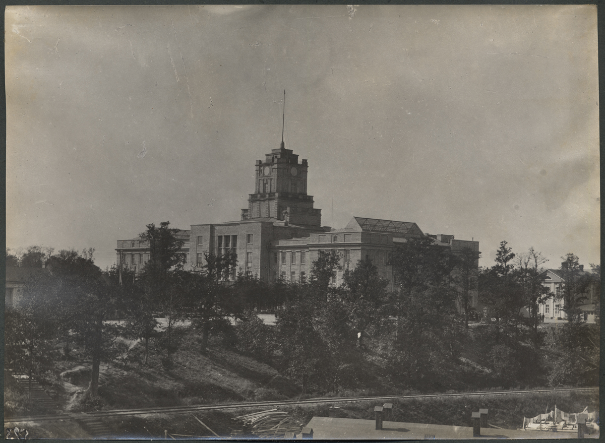 Vene-Balti laevatehas. Esiplaanil raudtee, selle taga puudesalu ja tehase haldushoone, hilisem TPI pehoone